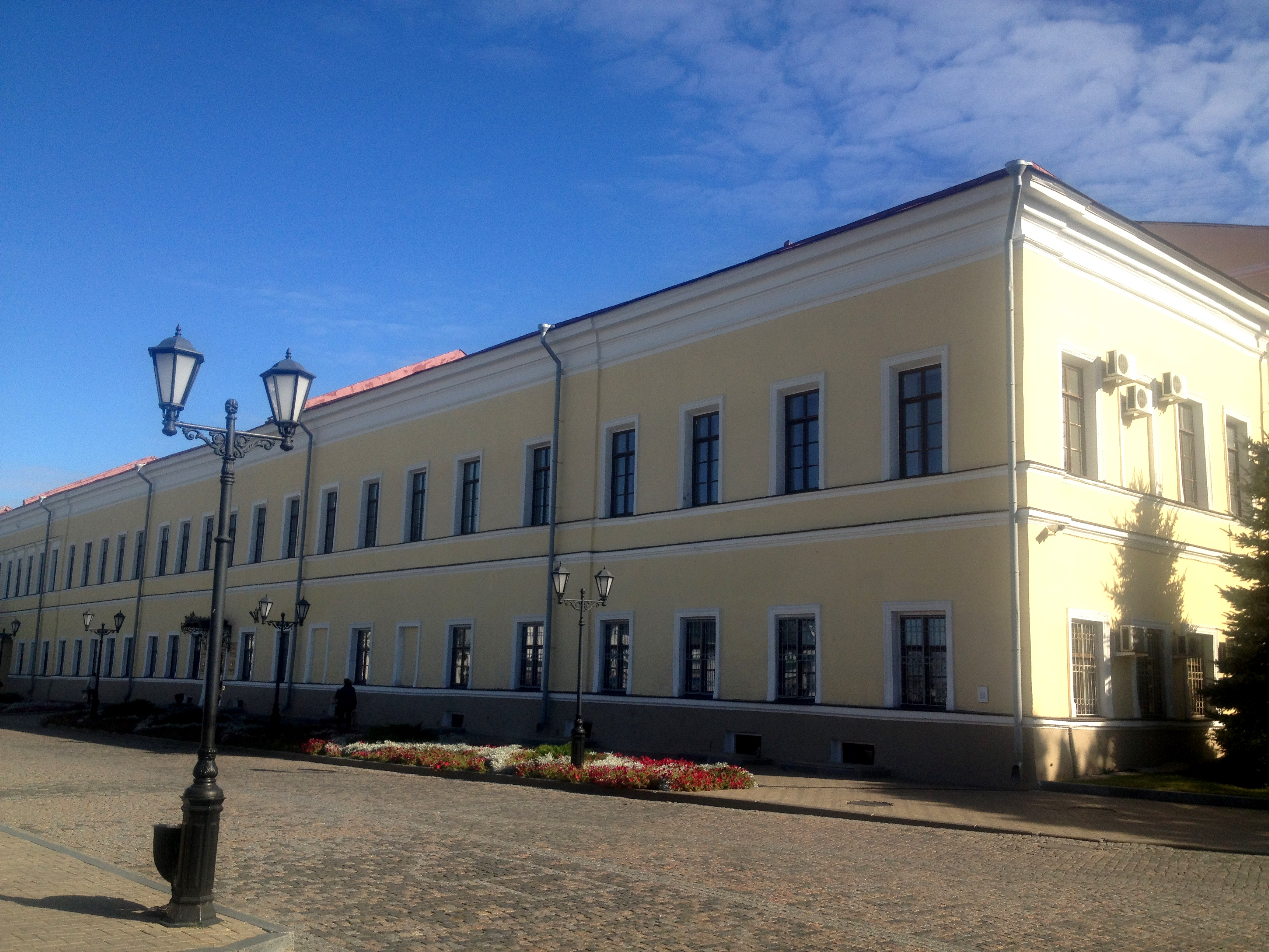 Присутственные места: Кремль, Казань, Татарстан